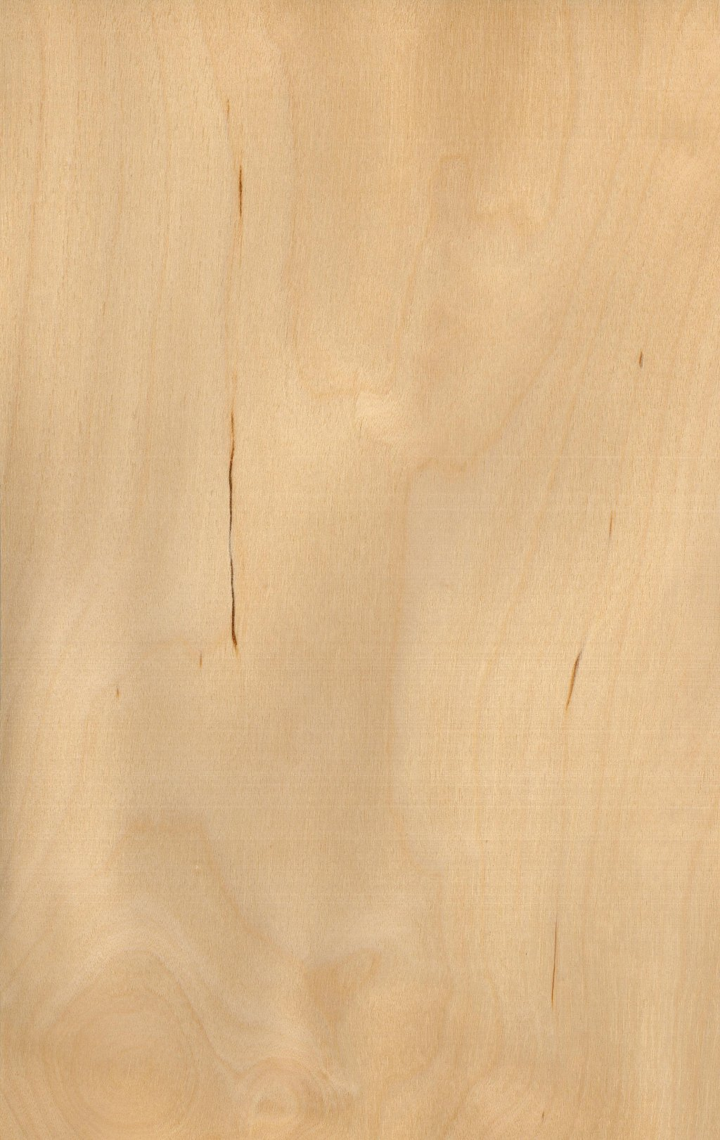 Birkenfurnier (Betula sp.), geschält